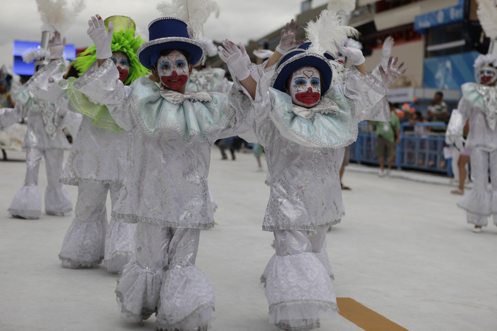 Rio de Janeiro - Pequenos sambistas fecham desfiles na Marquês de Sapucaí.